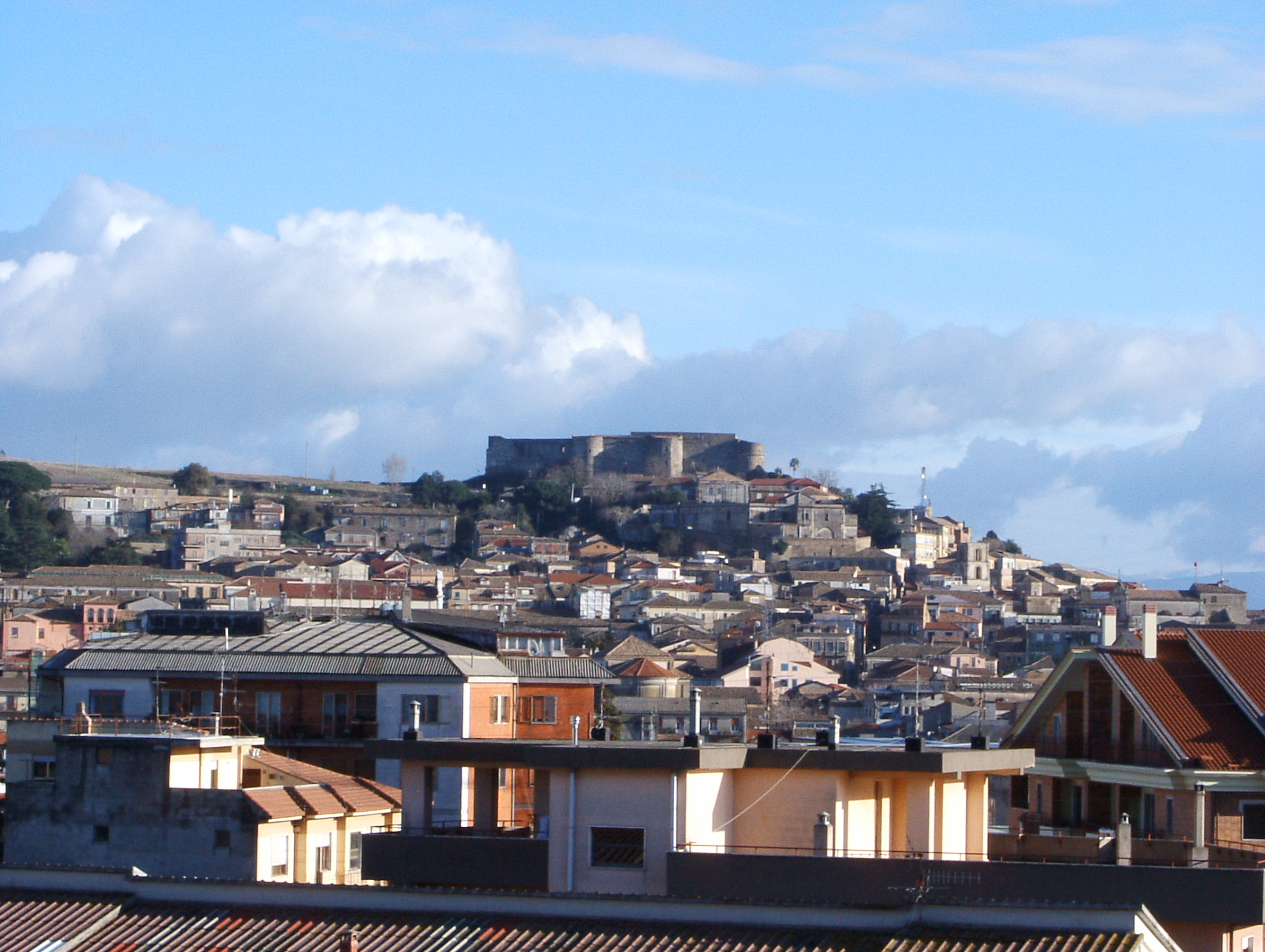 Vibo Valentia - Panorama.